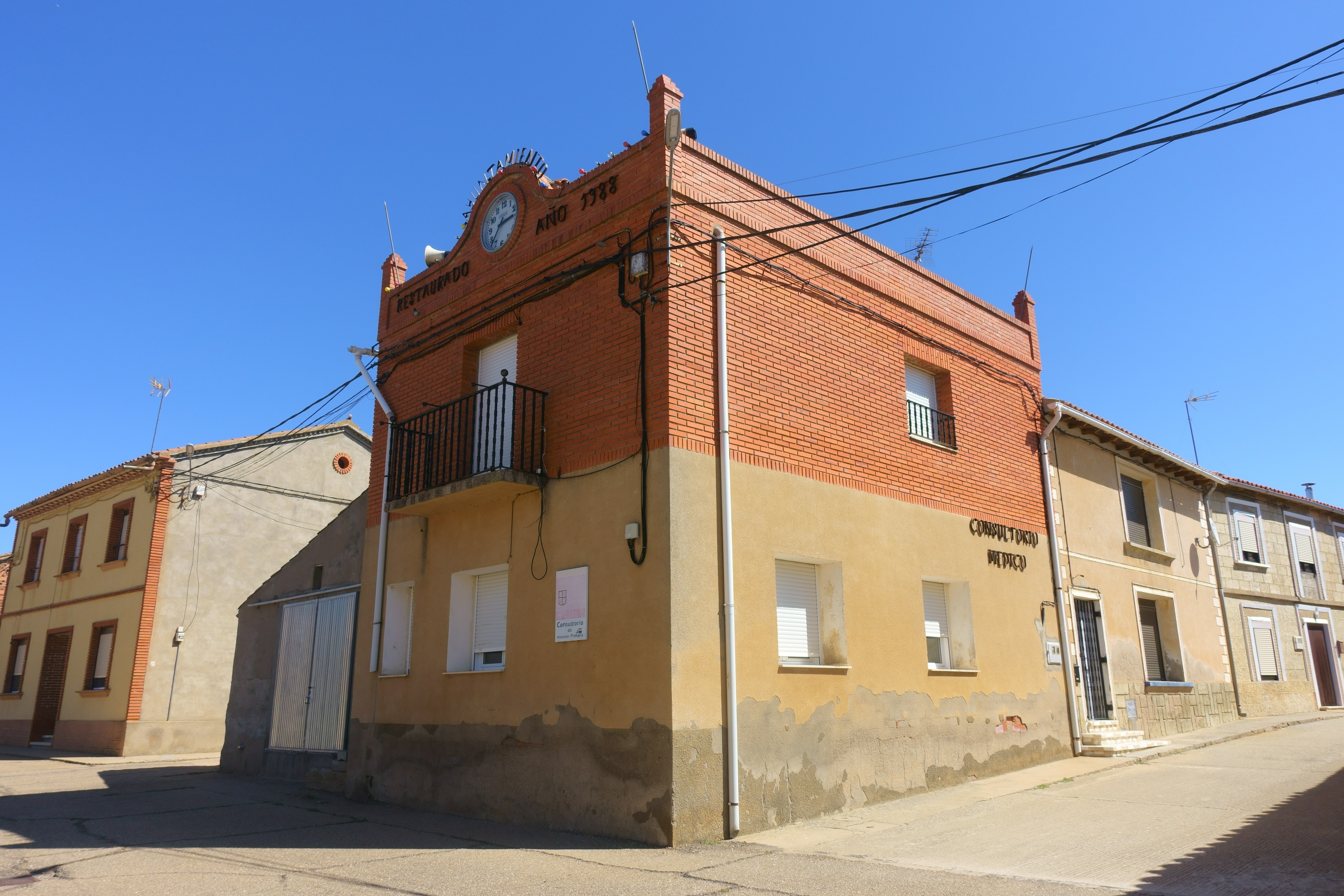 Casa consistorial de Quintanilla del Olmo (Zamora, España).